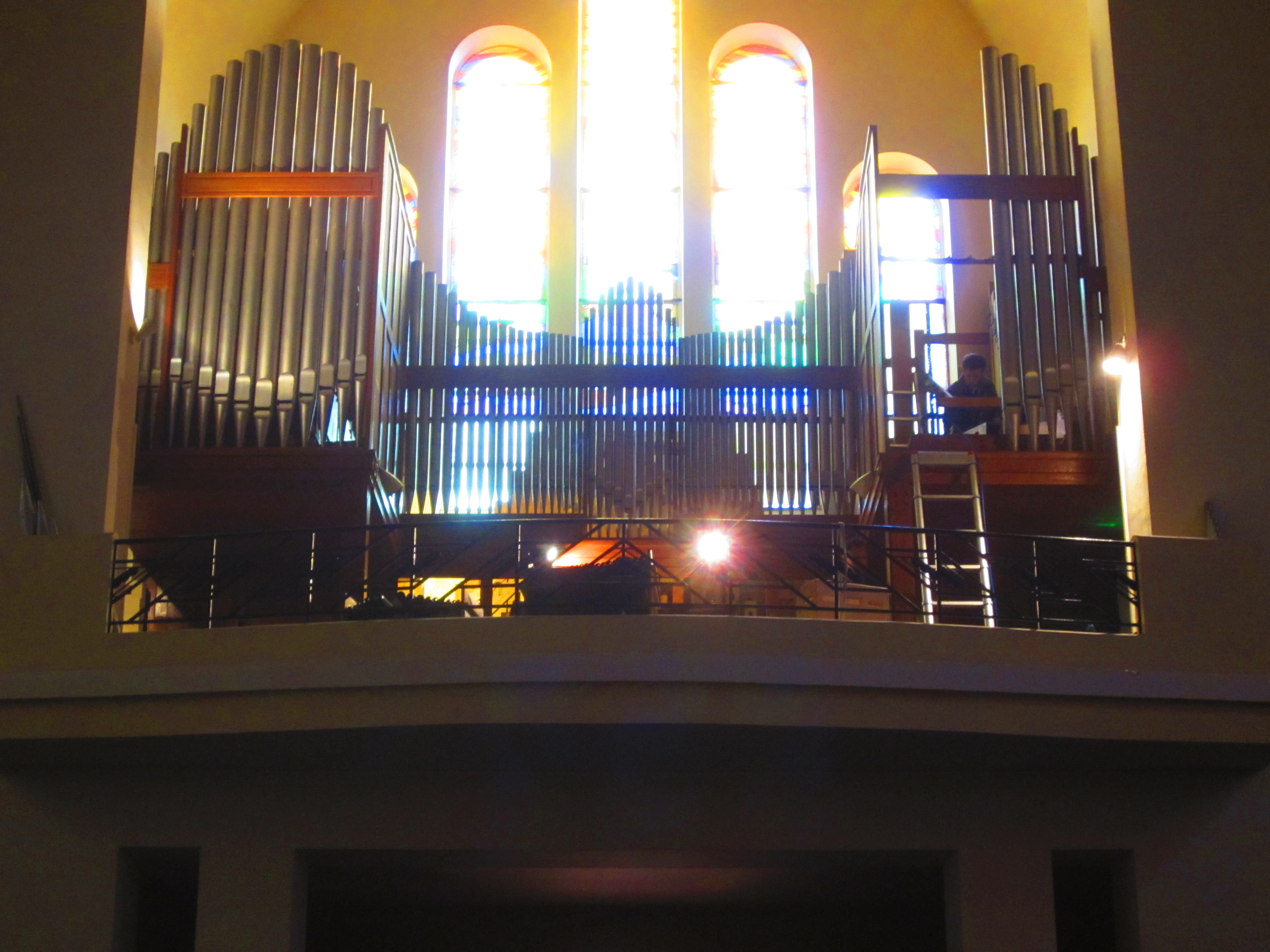 Église du Saint-Sacrement de Metz Devant-les-Ponts les orgues